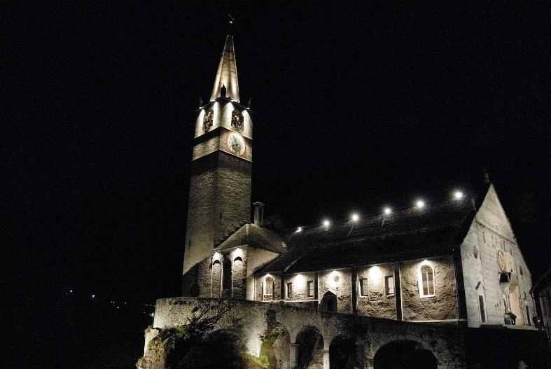 Chiesa monumentale di Baceno di notte